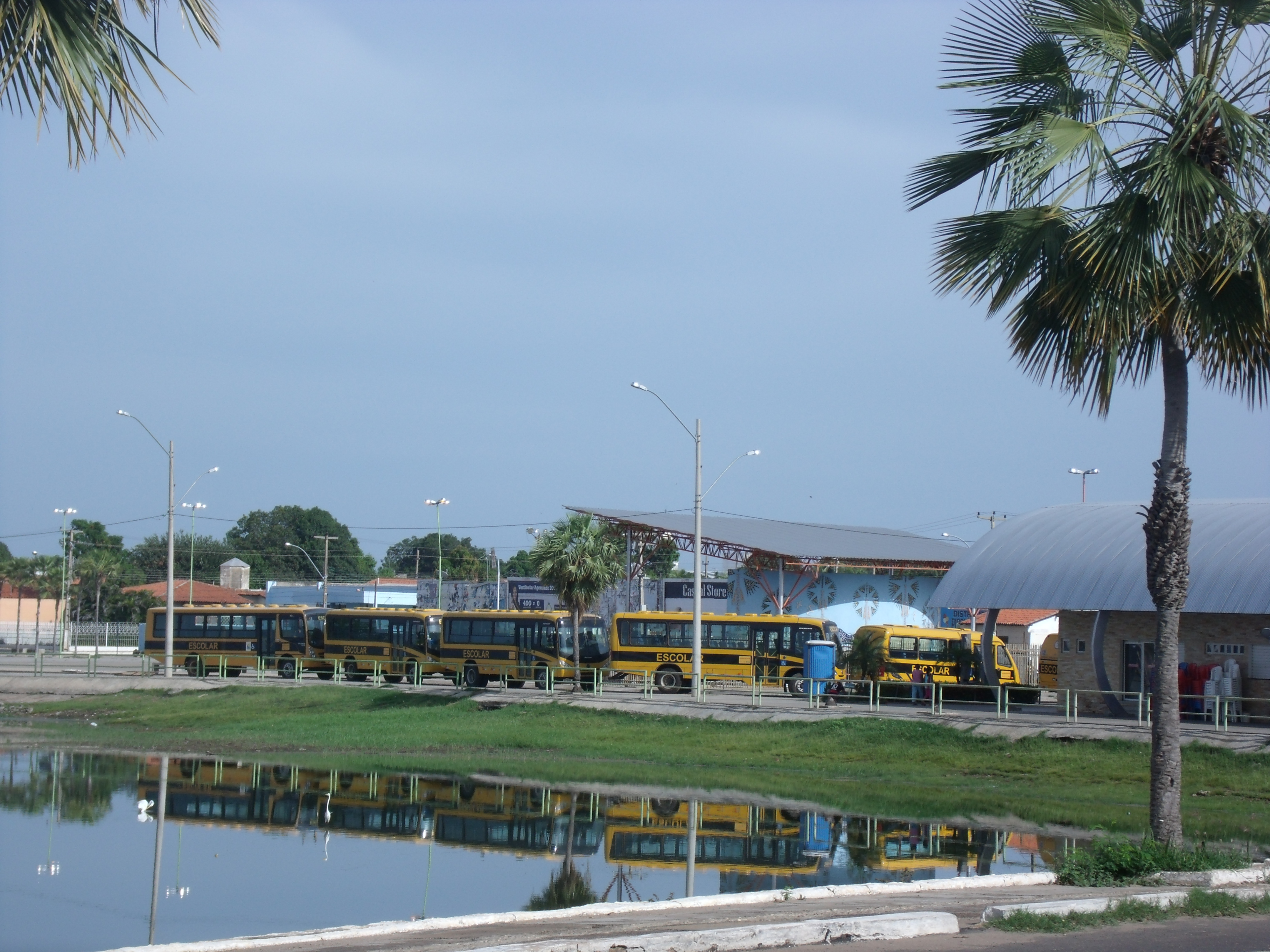 Onibus escolar do Ministério da Educação do Brasil.